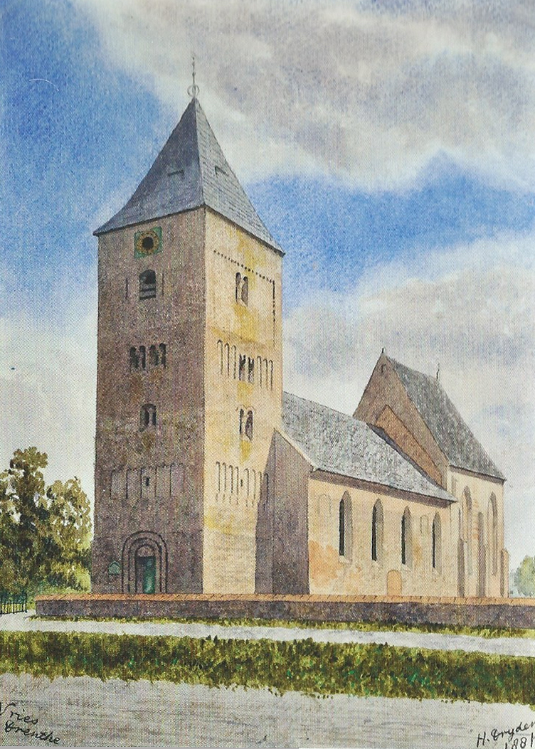 De Bonifatiuskerk van Vries getekend door Dryden in 1878 en voltooid in 1881